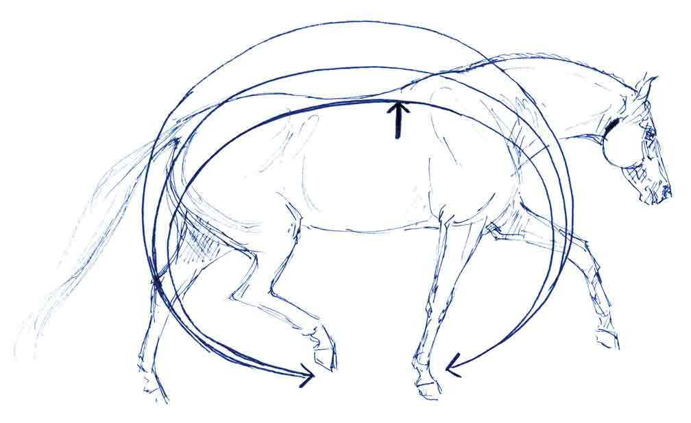 positive Wellenbewegung im Pferd, bei einem nach oben schwingenden Rücken